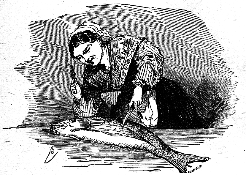 Pour la source voir : Discuter:Contes d'Andersen Vignette de L’Intrépide Soldat de plomb par Bertall représentant La cuisinière découpant le poisson. Catégorie:Bertall